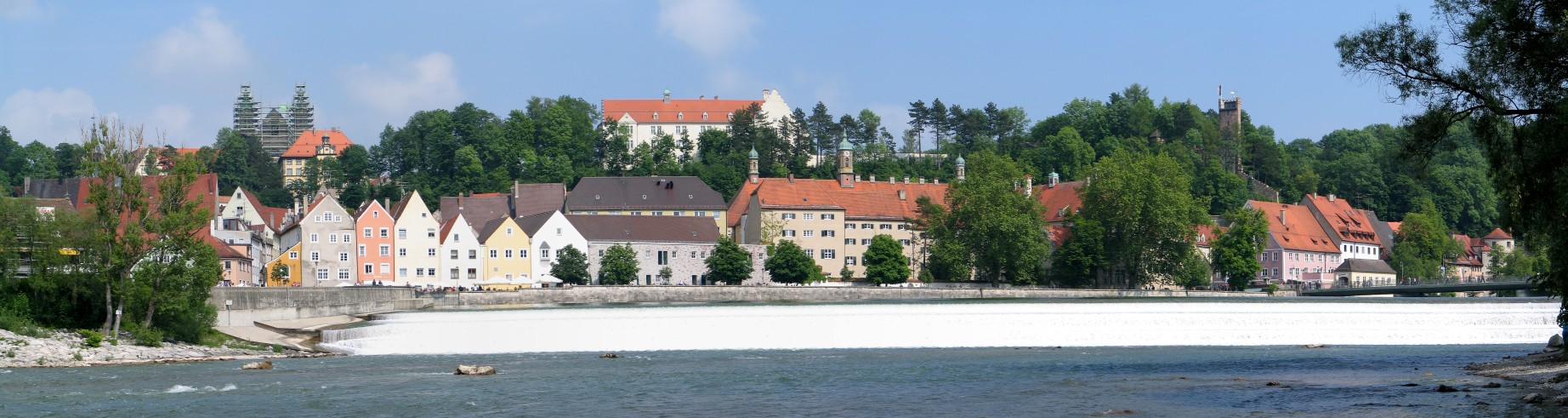 Beschreibung: Lechwehr mit Landsberg am Lech im Hintergrund Quelle: selbst fotografiert Datum: 12. Juni 2005 Fotograf / Zeichner: Patrick Huebgen Kategorie:Bild:Panorama Kategorie:Landsberg am Lech